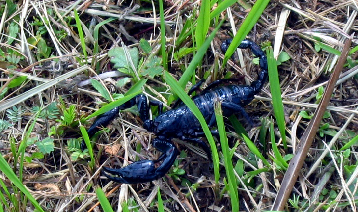 Thaiskorpion